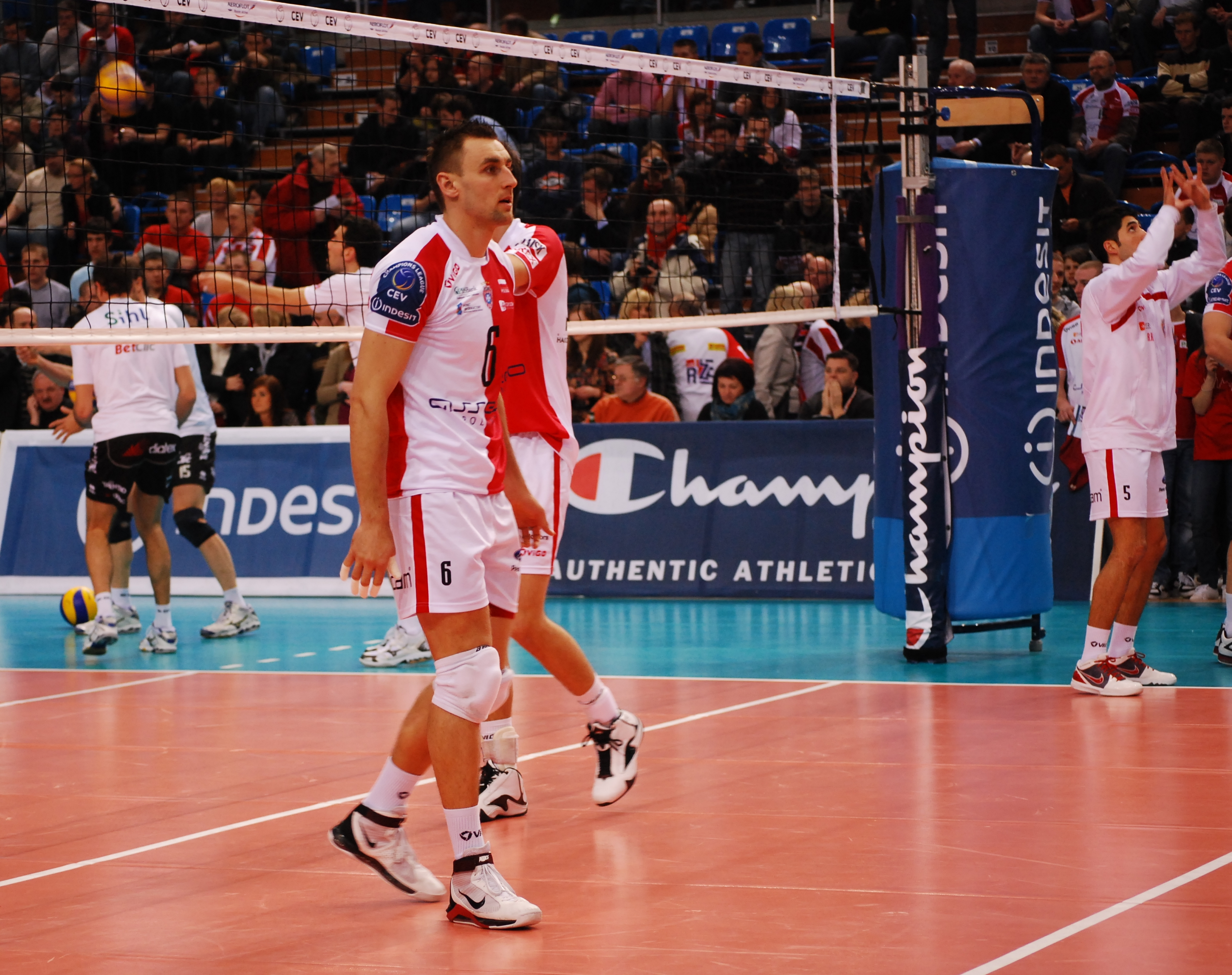 Marcin Wika